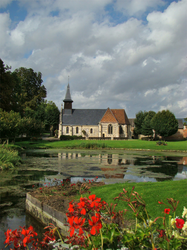 Lisors, Eure, Normandie, France.